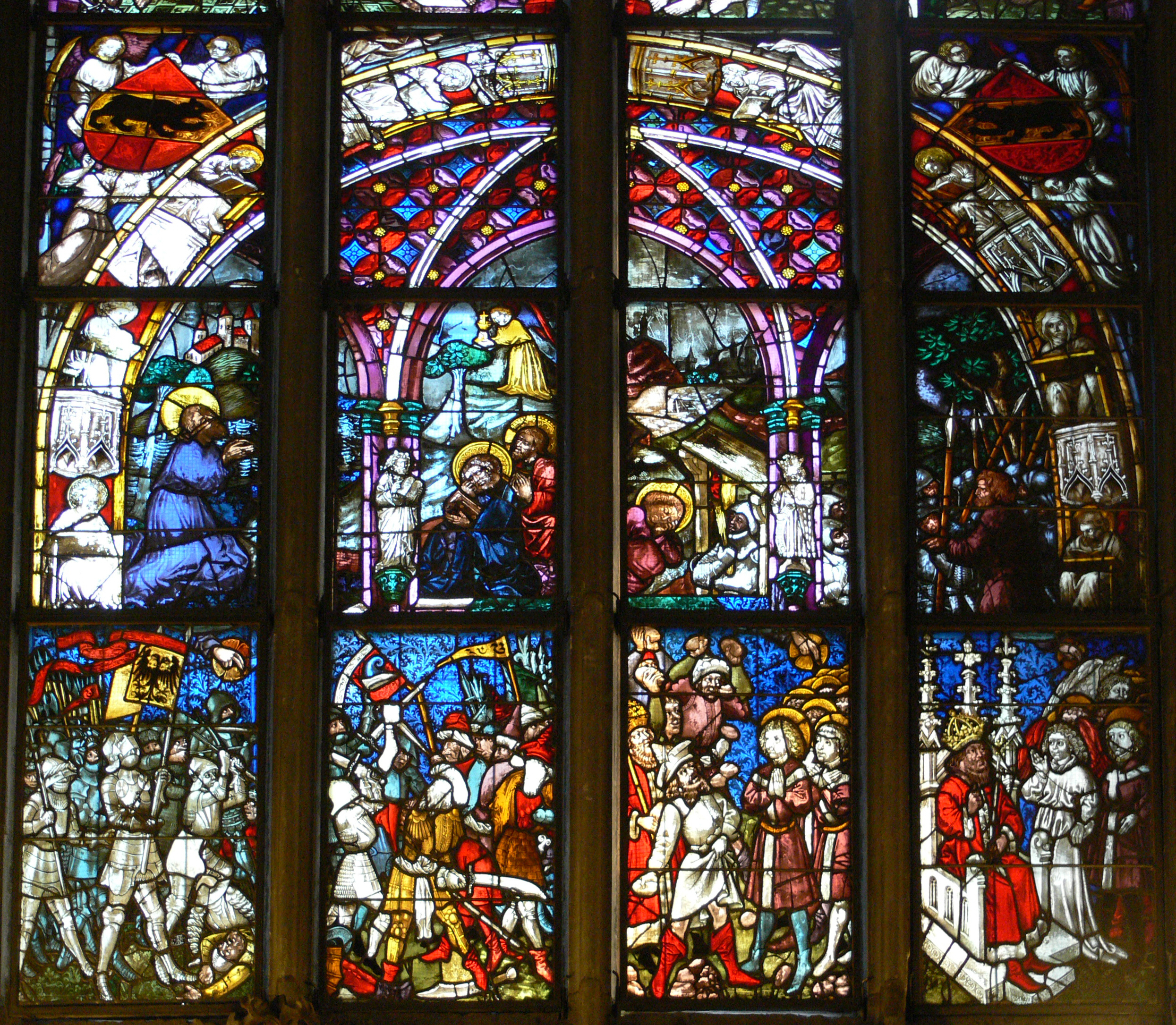 Berner Münster Passionsfenster, Teilansicht